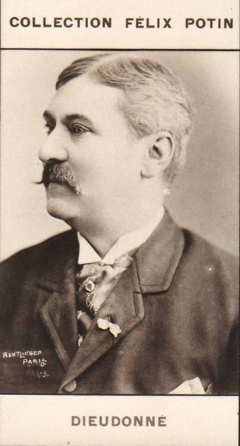 Dieudonné